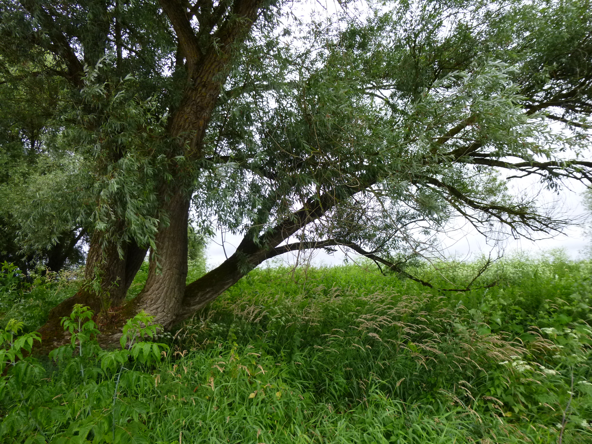 Weide (Salix sp.) in den Donau-Auen bei Bogen, Niederbayern; FFH-Gebiet „Donauauen zwischen Straubing und Vilshofen“